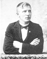 (Christopher) Nyholm Debess